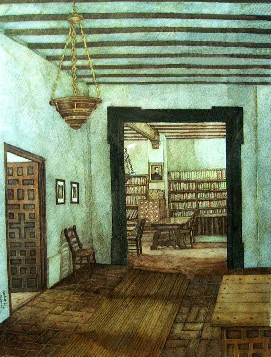 Casa del Inca, donde vivió el Inca Garcilaso de la Vega